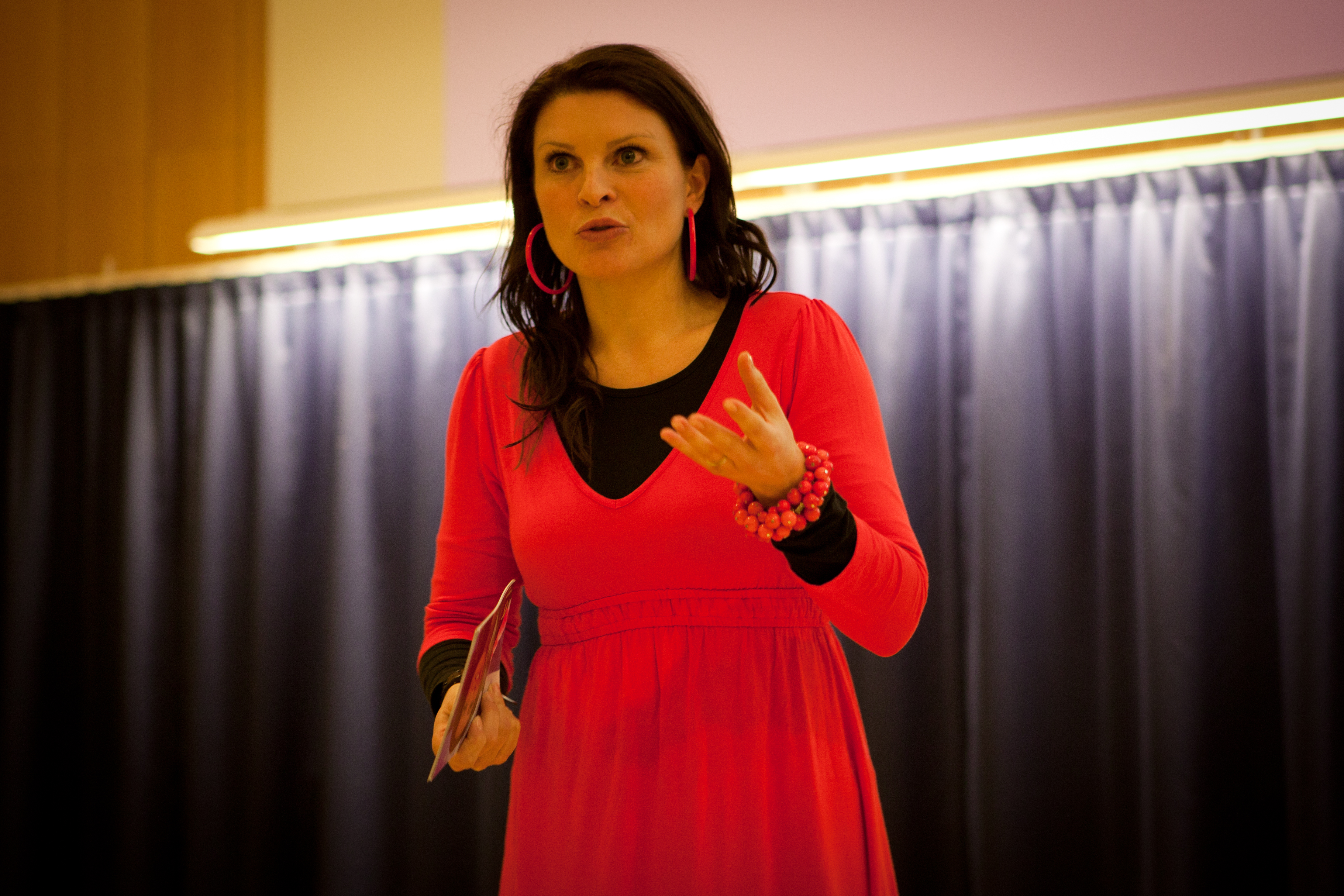 8. mars 2011 arrangerte OLF sammen med SyMaskinen ved NTNU "Jenter for Realfag" i Trondheim.